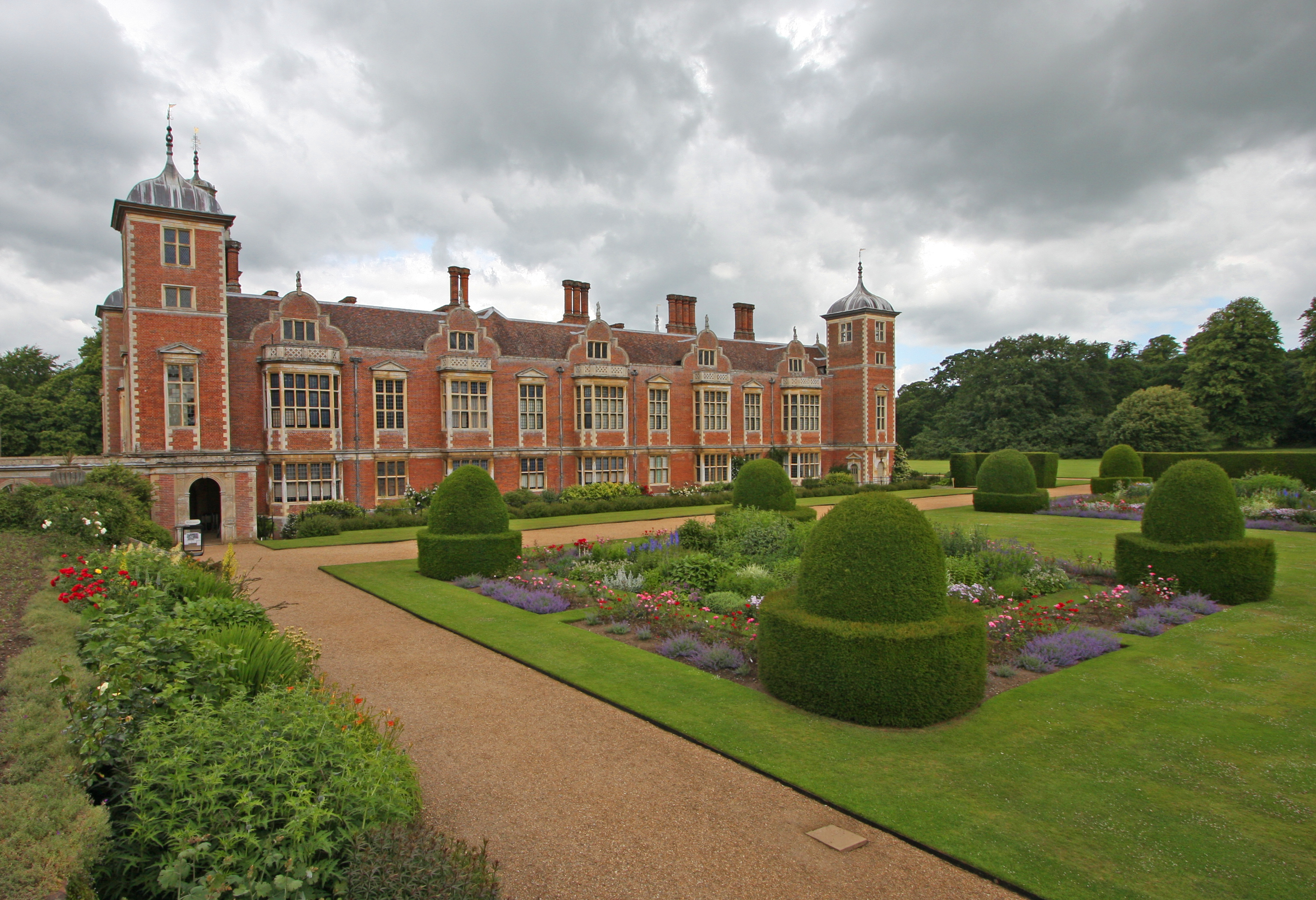 Blickling Hall and garden